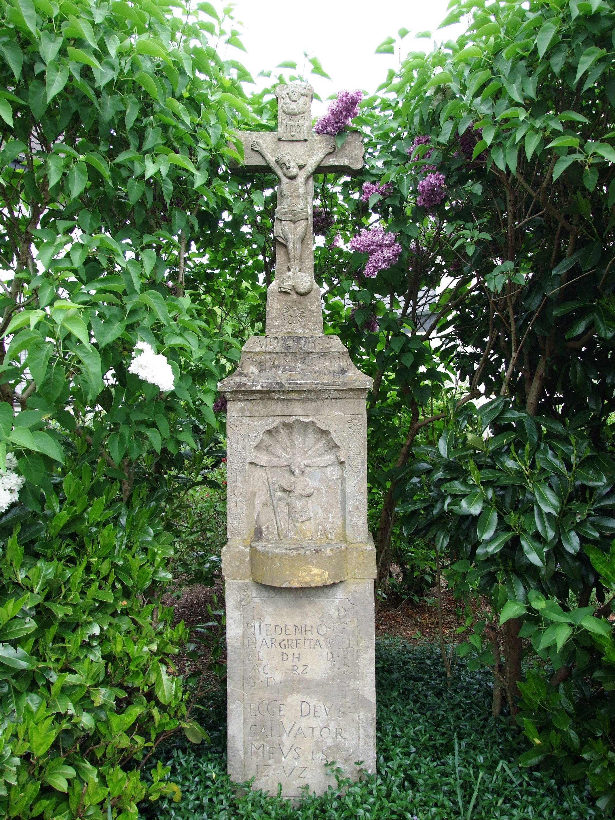 Bergisch Gladbach, Denkmal Nr. 34, Gesamtansicht